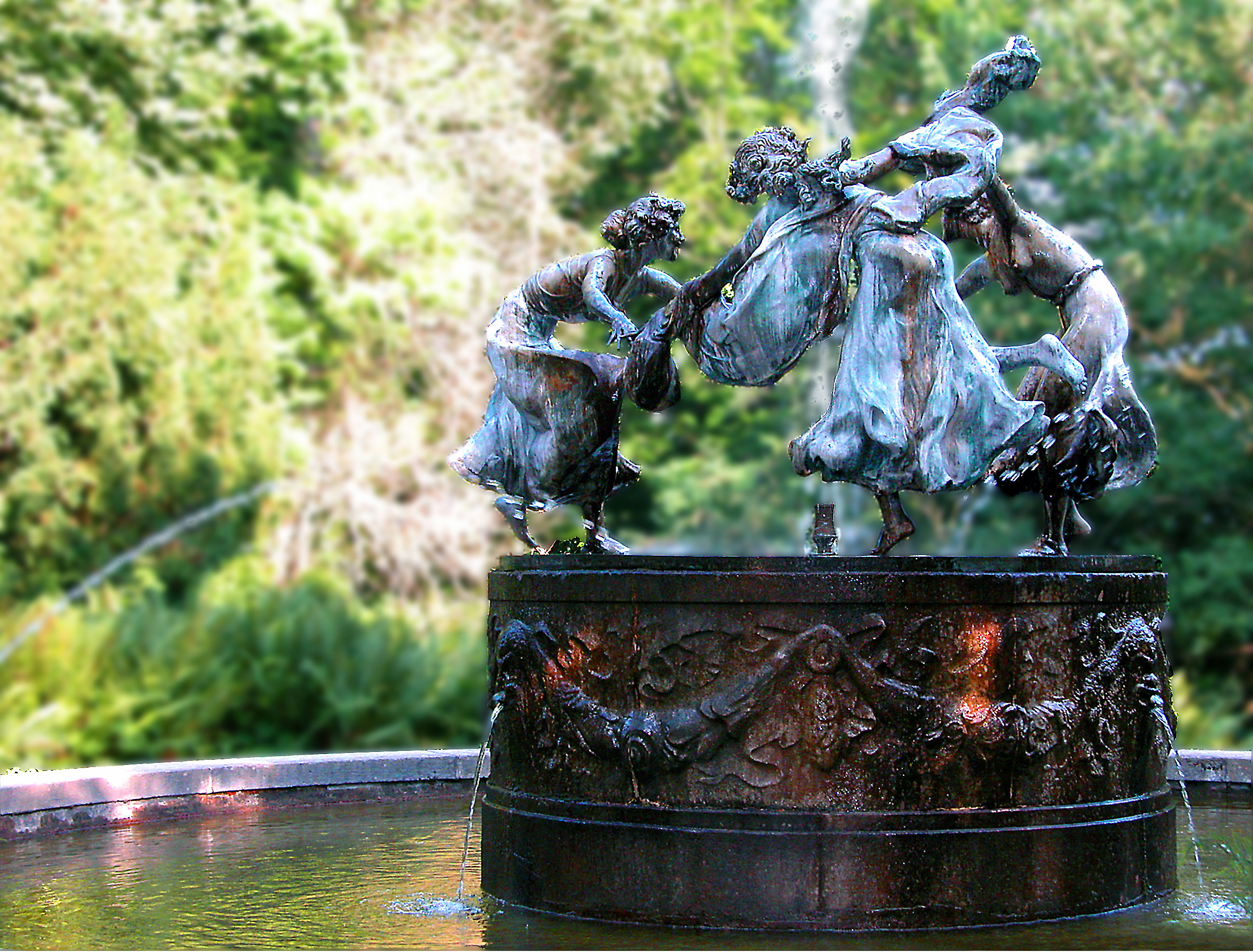 05.07.2003 17166 Burg Schlitz (Gem. Hohen Demzin): Mecklenburgs bedeutendste klassizistische Schloßanlage (1806-1824). Der Nymphenbrunnen (GMP: 53.701102,12.542426) im Park wurde 1903 von Walter Schott im Jugendstil für den Brunnenhof des Kaufhauses Wertheim in Berlin entworfen und vermutlich 1934 von Emil Georg von Stauß nach Burg Schlitz geholt. Dieses mittlerweile weltberühmte Wasserspiel, welches auch "Brunnen der tanzenden Mädchen" genannt wird, wurde in Bronze gegossen und ist unter Anderem im Central Park von New York (sogenannte Untermeyer-Fountain), in San Francisco, in Antwerpen und in einer diplomatisch genutzten Villa in Berlin zu bewundern. [DSCN]20030705750DR.JPG(c)Blobelt